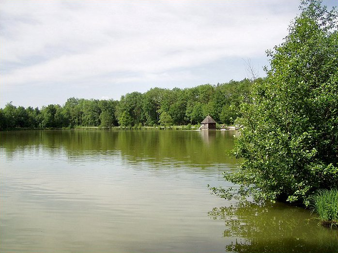 Großer Schacherteich in der Gemeinde Kremsmünster